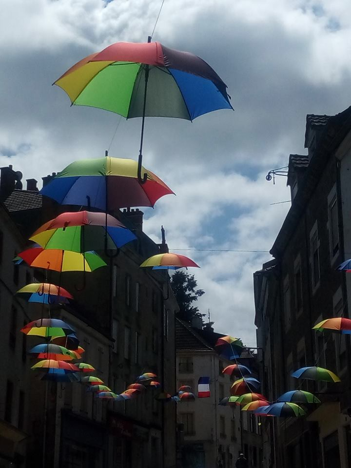 Parapluies colorés suspendus en centre-ville de La Clayette. Ce type d'installations s'inspire de l'Umbrella Sky Project, un concept développé en 2012 par l'artiste portugaise Patricia Cunha.